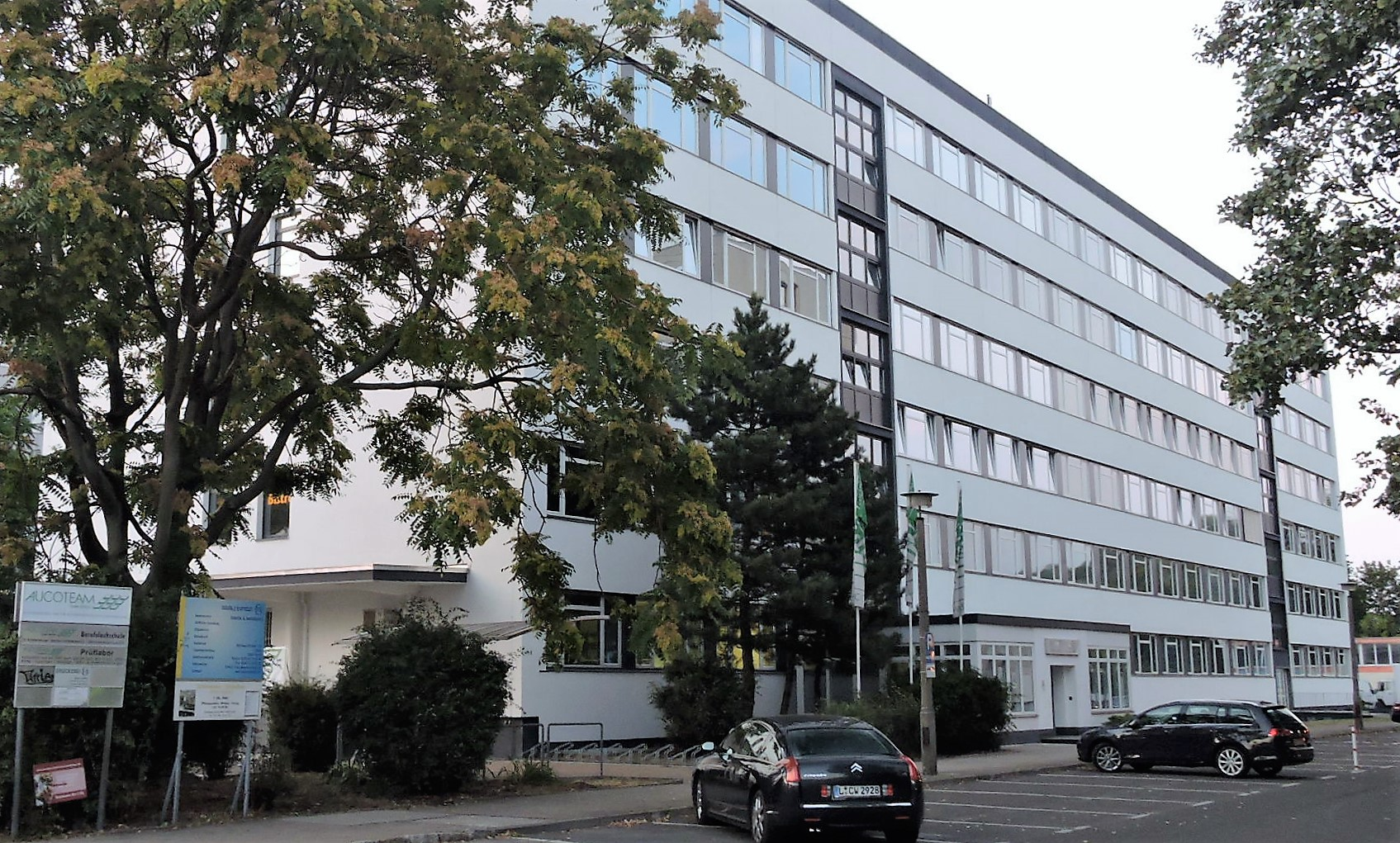 Institut für Regelungstechnik, Berlin (1968-1990)